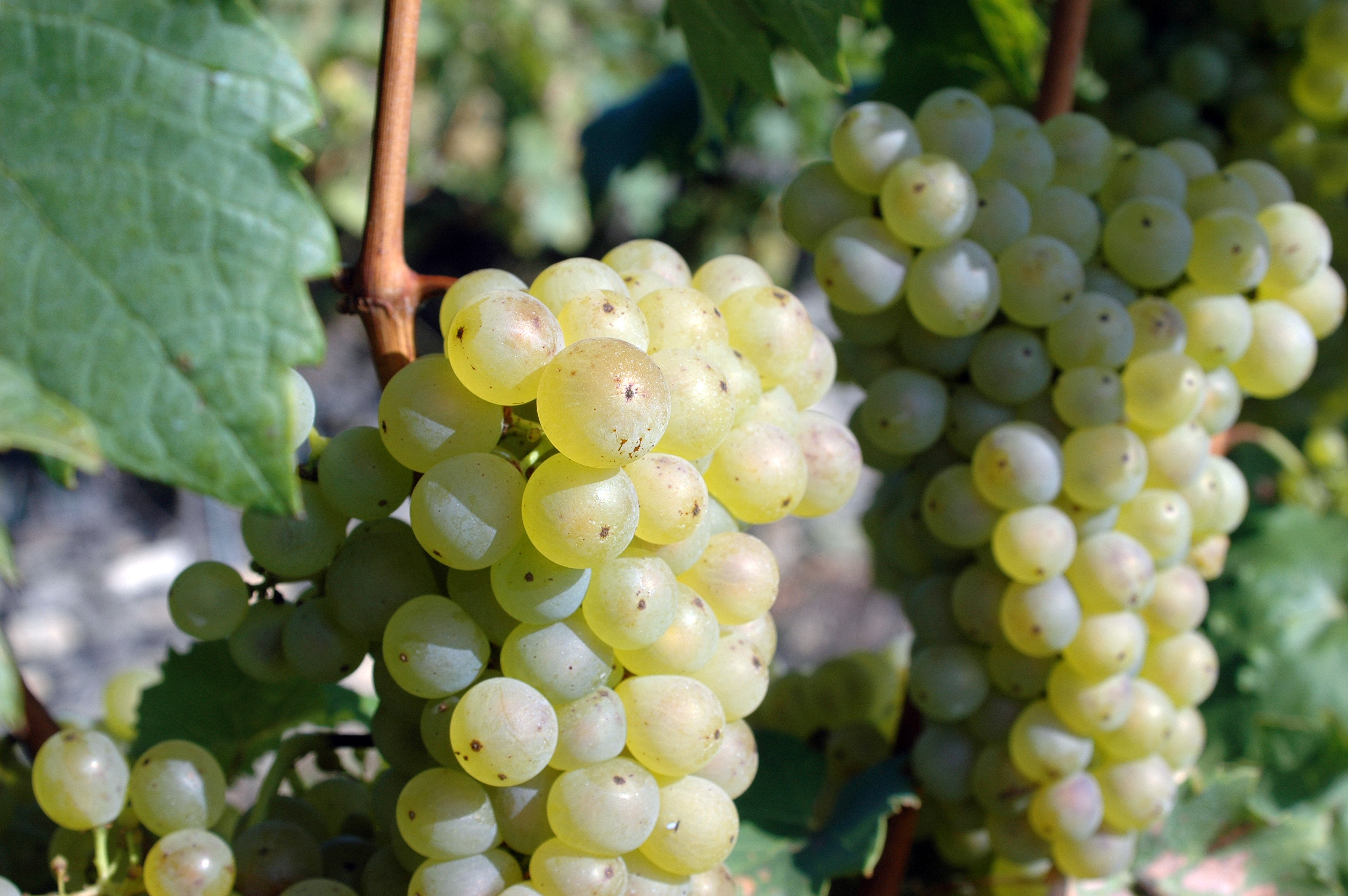 Trauben der Rebsorte Riesling (Rheinriesling)